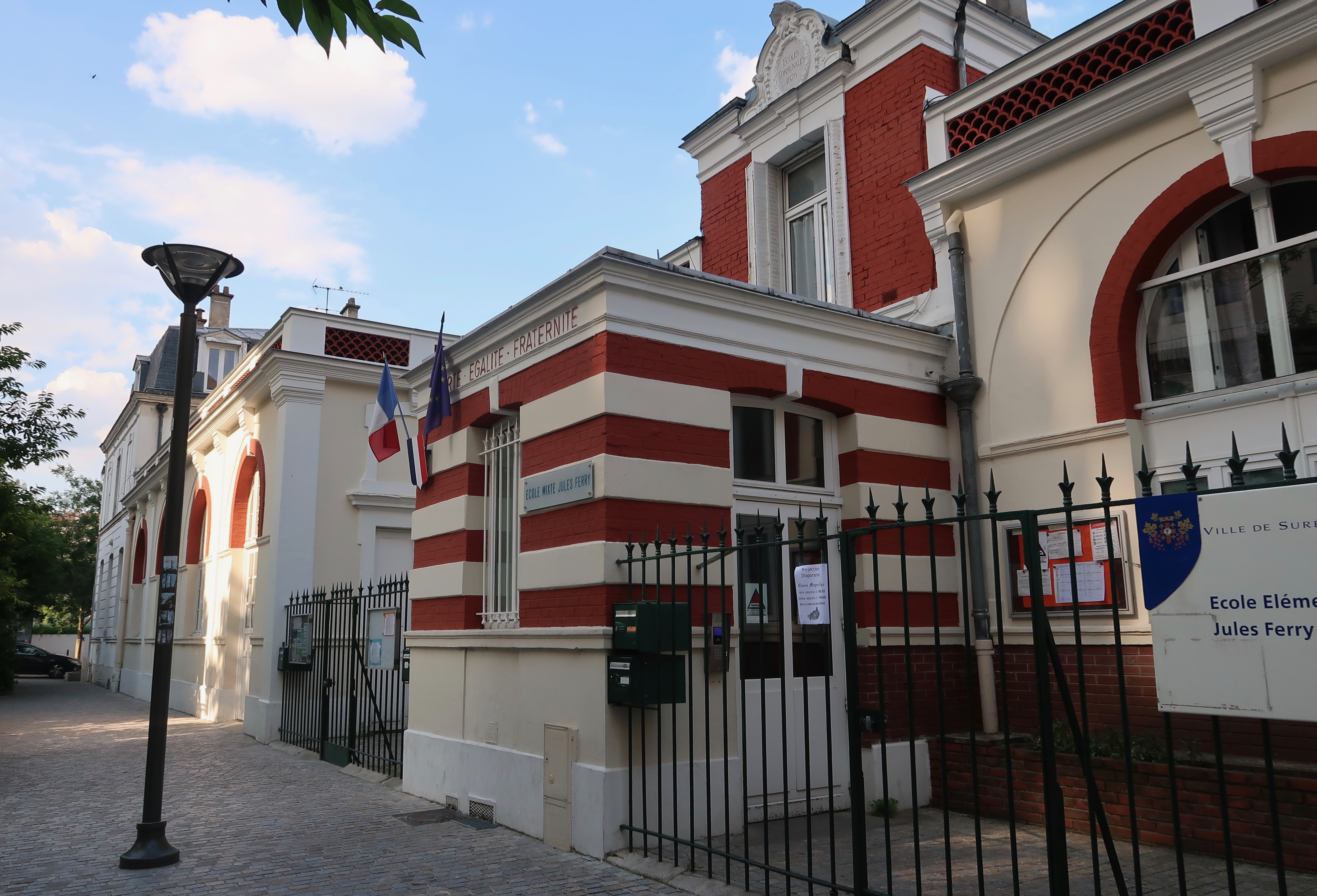 École élémentaire Jules-Ferry à Suresnes, 12 rue Jules-Ferry (Hauts-de-Seine).